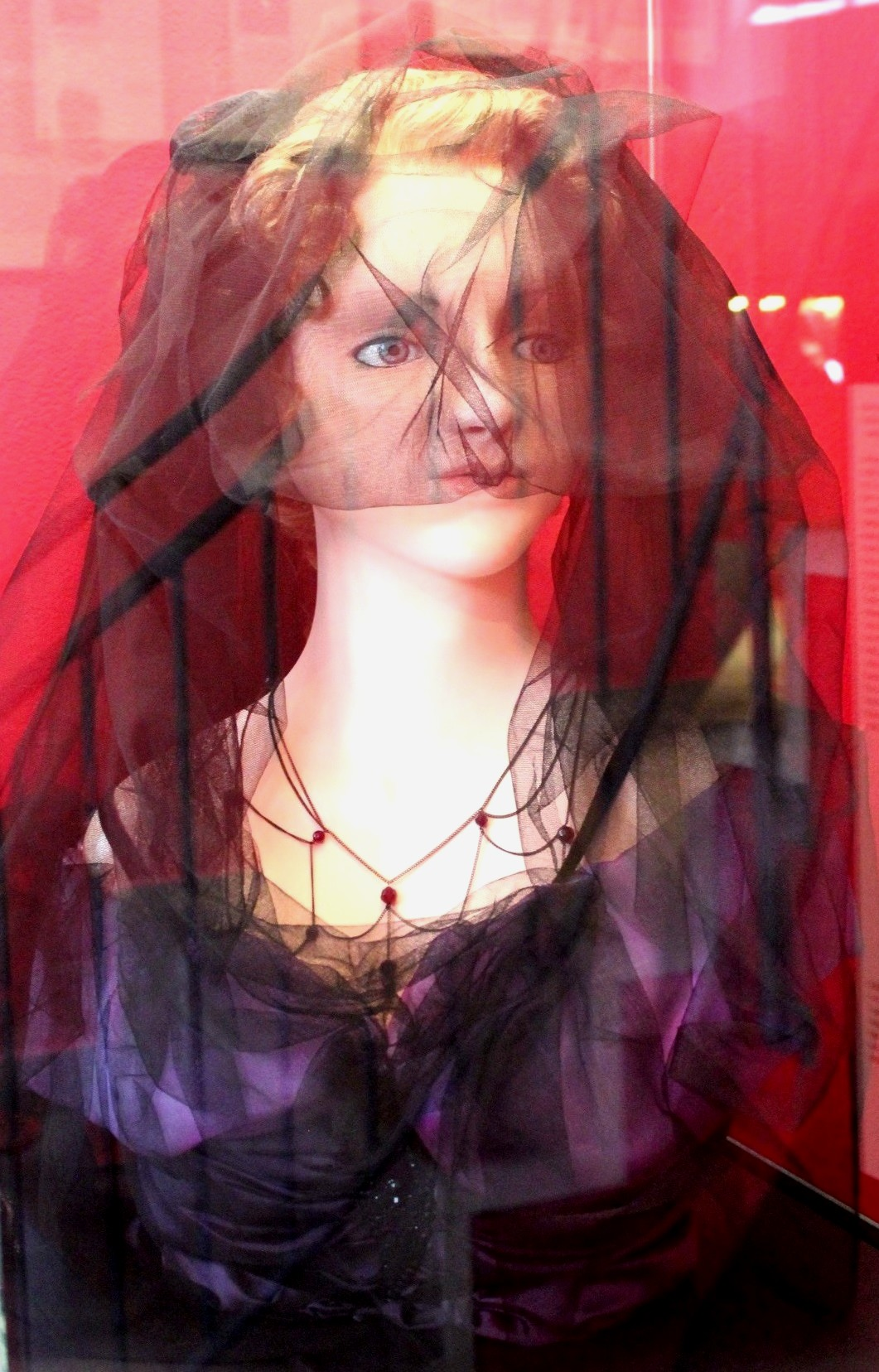 Bildnisbüste der Dunkelgräfin mit Echthaarperücke im Stadtmuseum Hildburghausen (angefertigt durch Susanne Besser nach dem 3D-Scan des 2013 geborgenen Schädels)